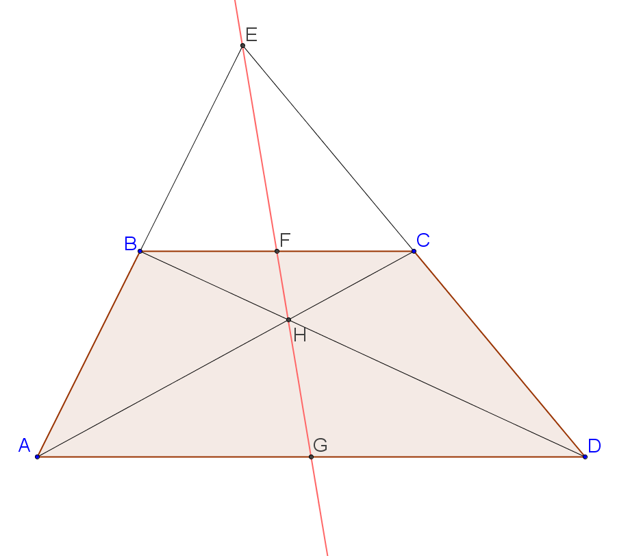 файл создан в среде GeoGebra